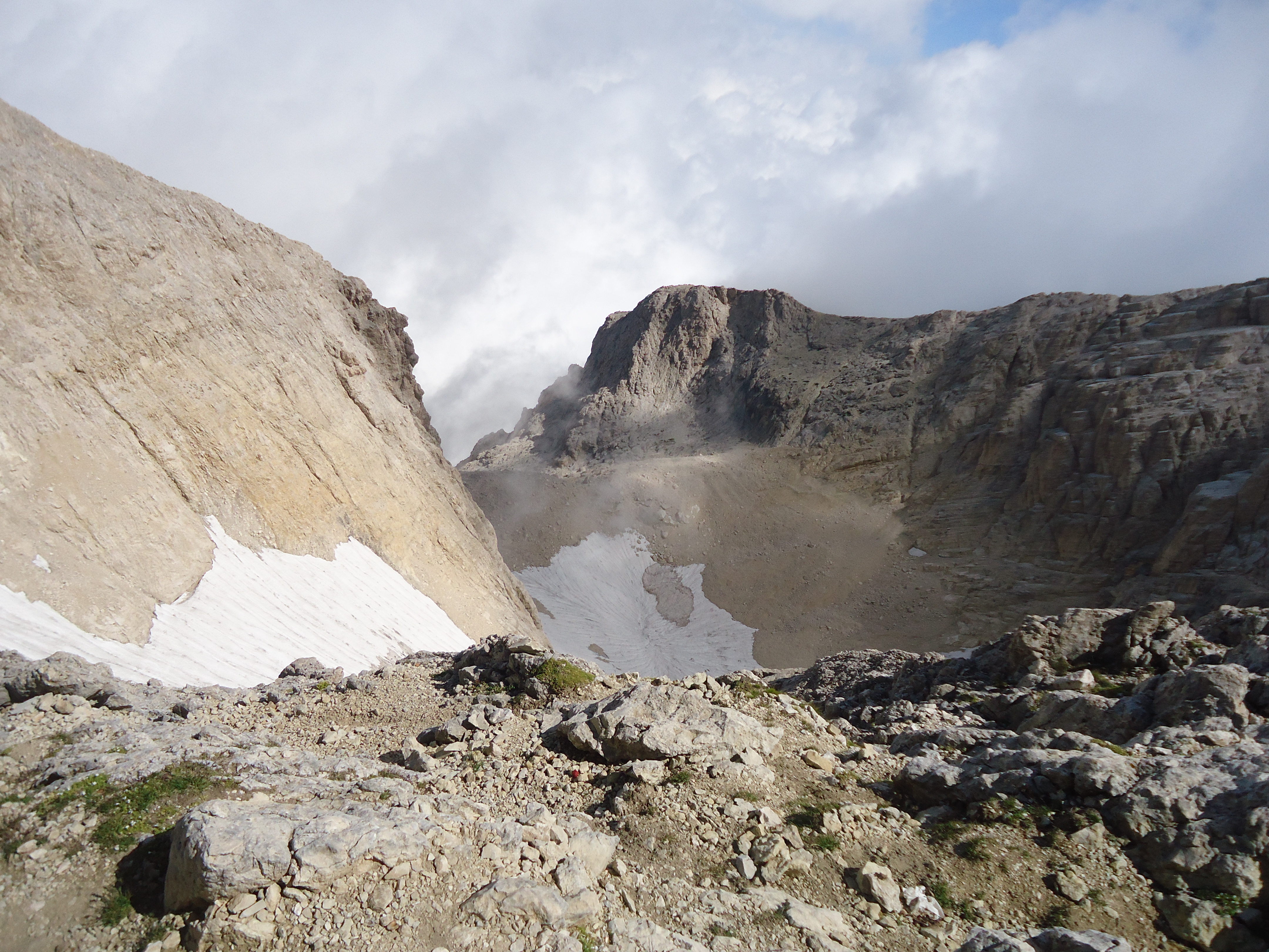 Il Canalone